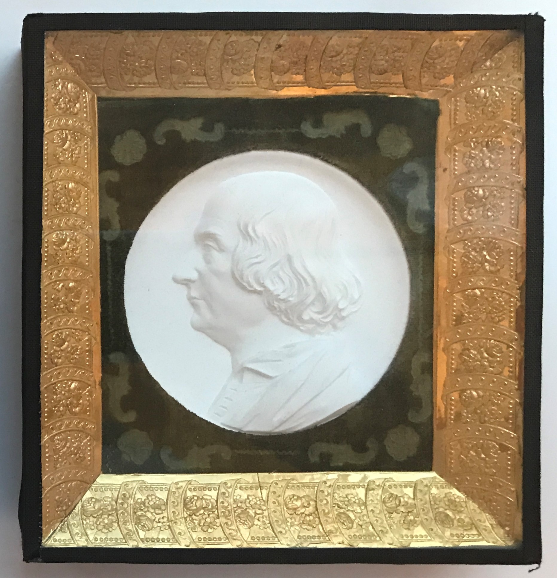 Reliefmedaillon von Christian Daniel Vogel